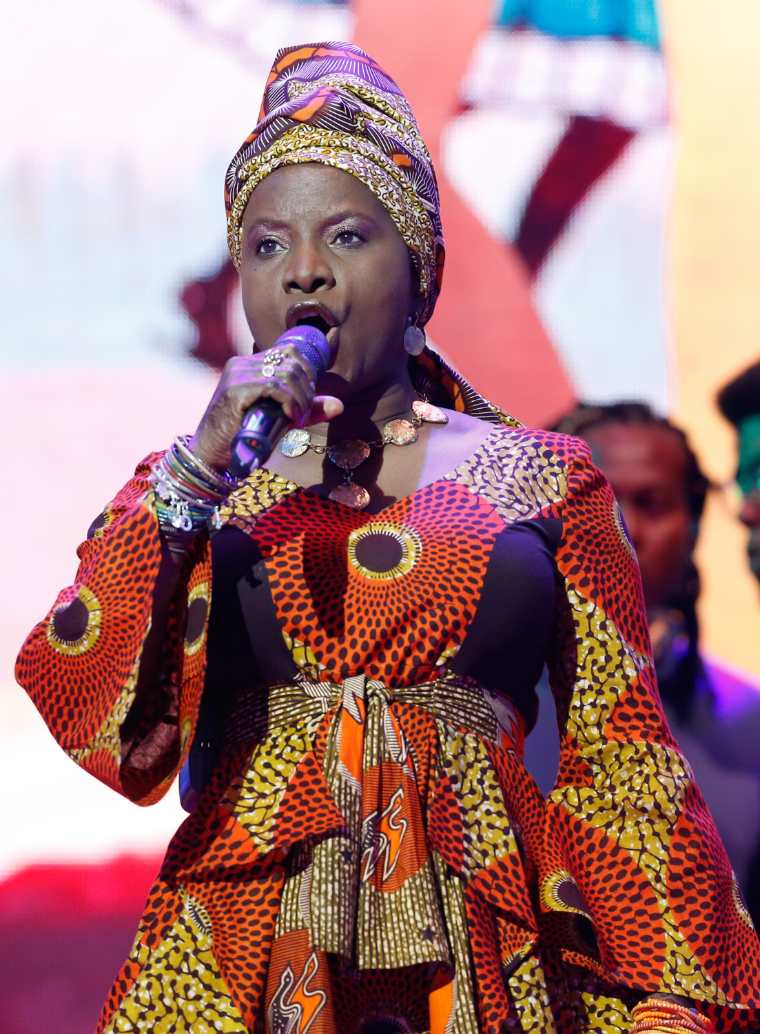 Angelique Kidjo durante o 25o Premio da Musica Brasileira no Theatro Municipal. Foto: Roberto Filho (14/05/14)